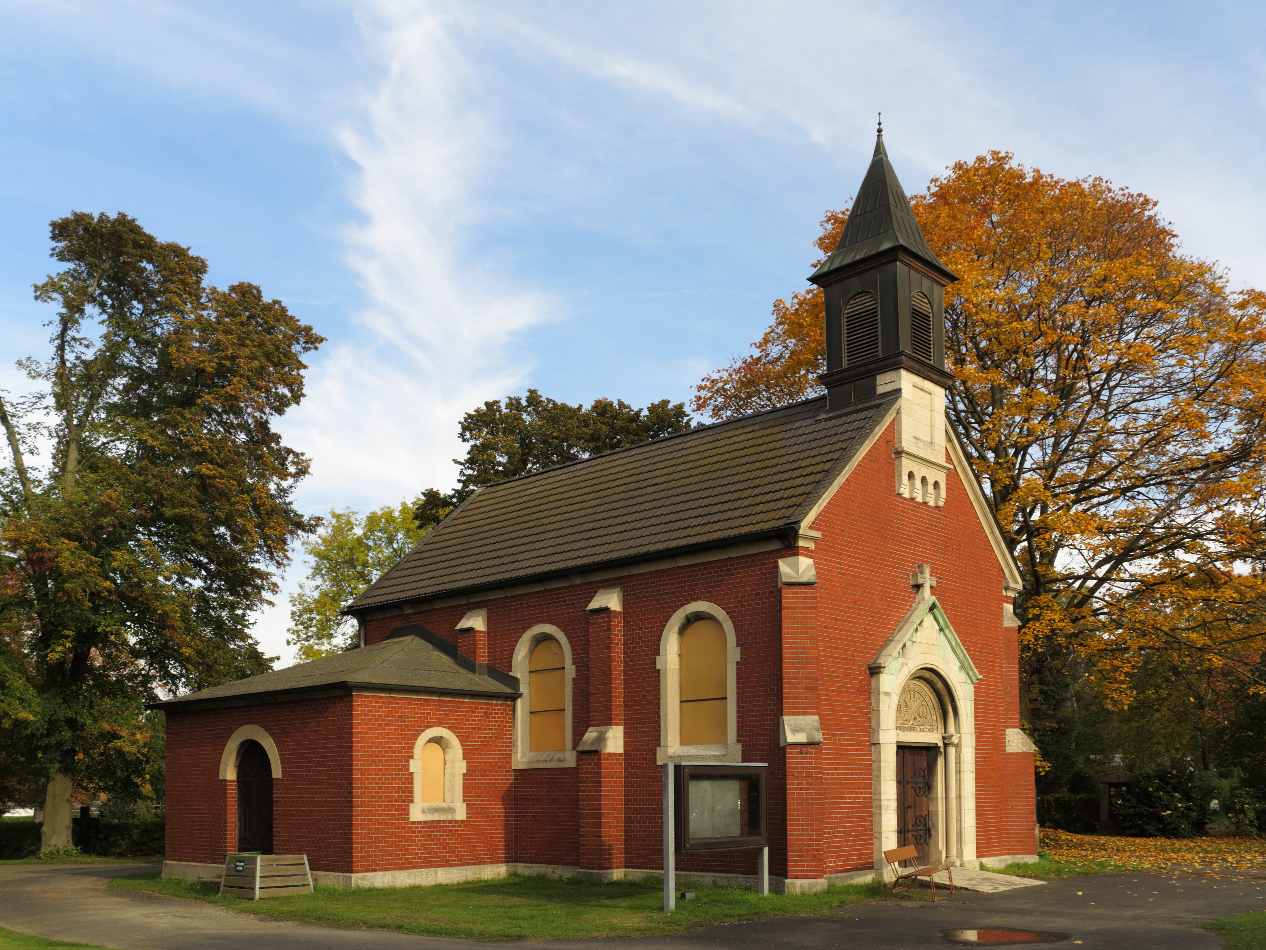 Braunschweig: die Kapelle auf dem Katholischen Friedhof.